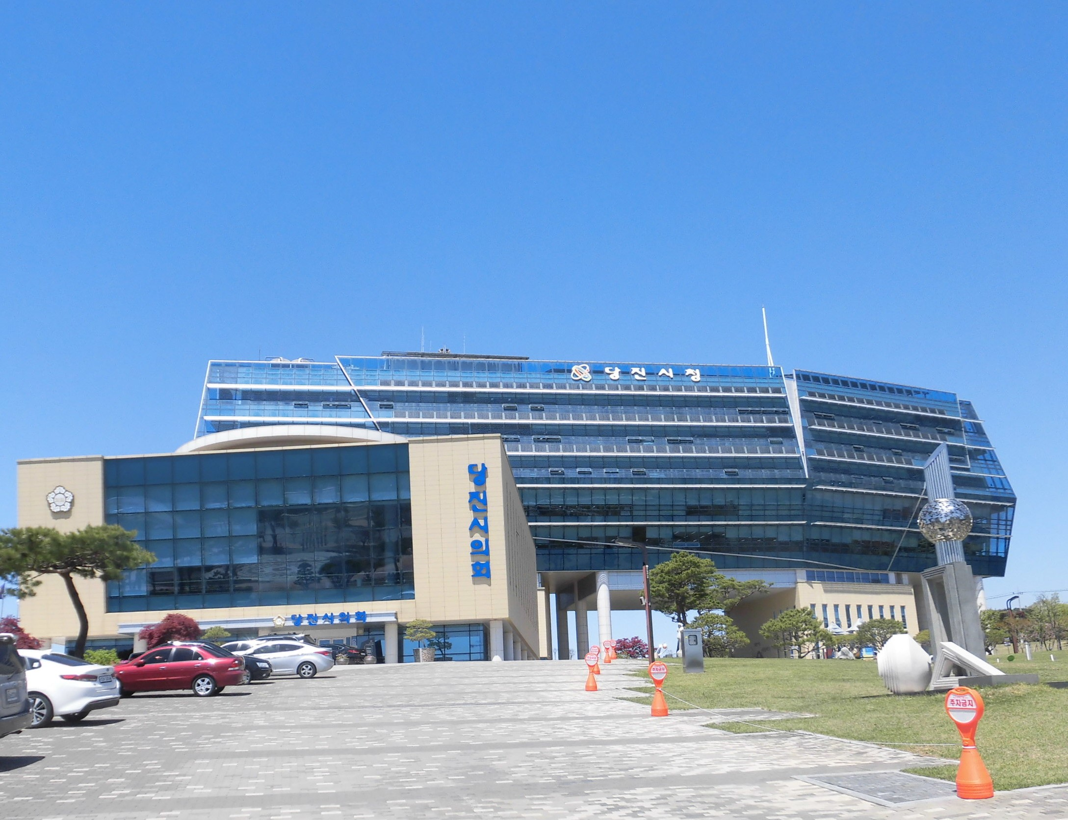 충청남도 당진시에 있는 당진시청